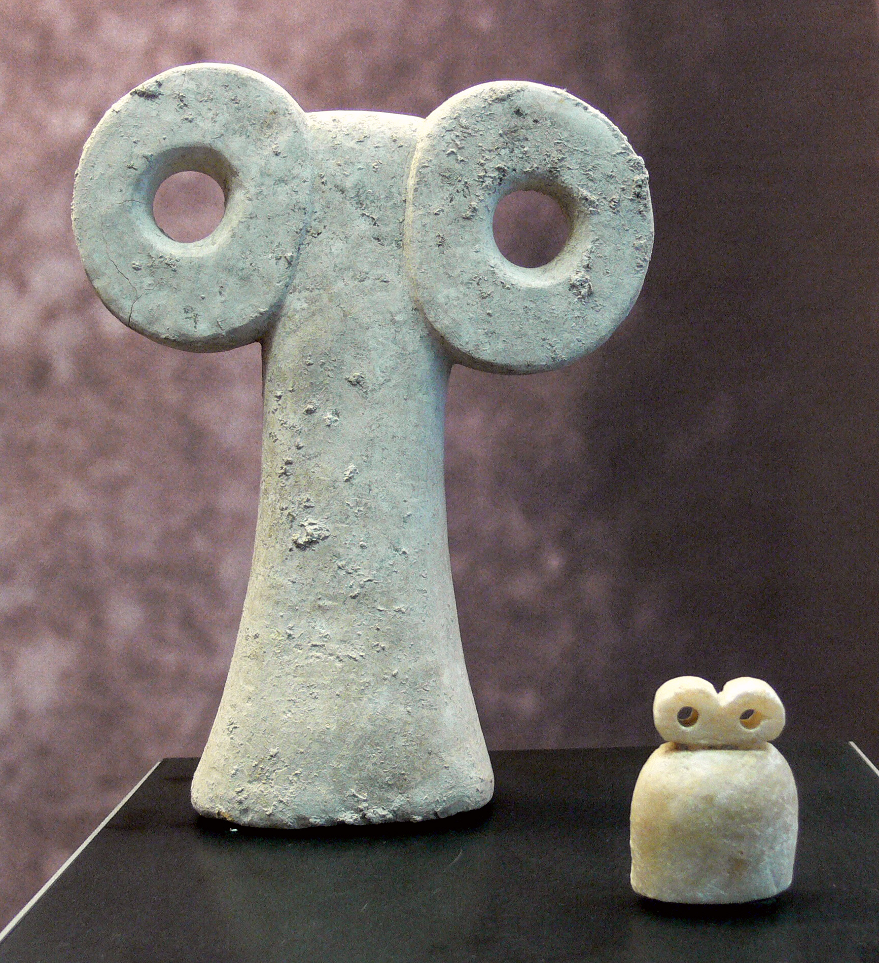 Schaffhausen, Museum zu Allerheiligen, Sammlung Ebnöther, (Abteilung "Idole") Zwei Augenidole, links: Kalkstein (Höhe 19,3 cm), rechts: Alabaster (Höhe: 4,6 cm), aus Syrien, 2. Hälfte des 4. Jahrtausend vor Christus; genaue Provenienz nicht angegeben; solche Idole wurden lt. Katalog gefunden in Tepe Gaura und im Augentempel von Tell Brak (Katalog 1999, S. 22)